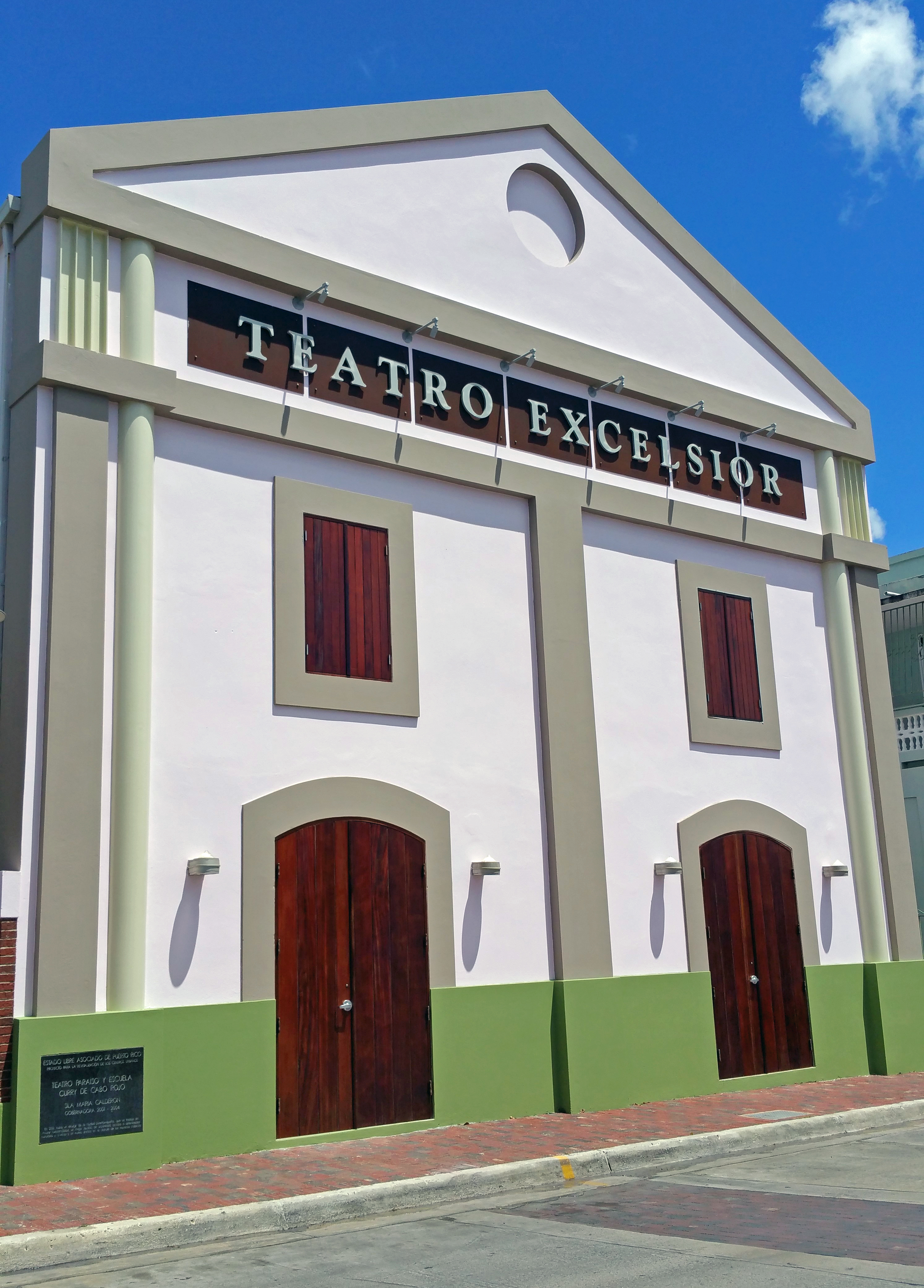 Teatro Excelsior - Cabo Rojo